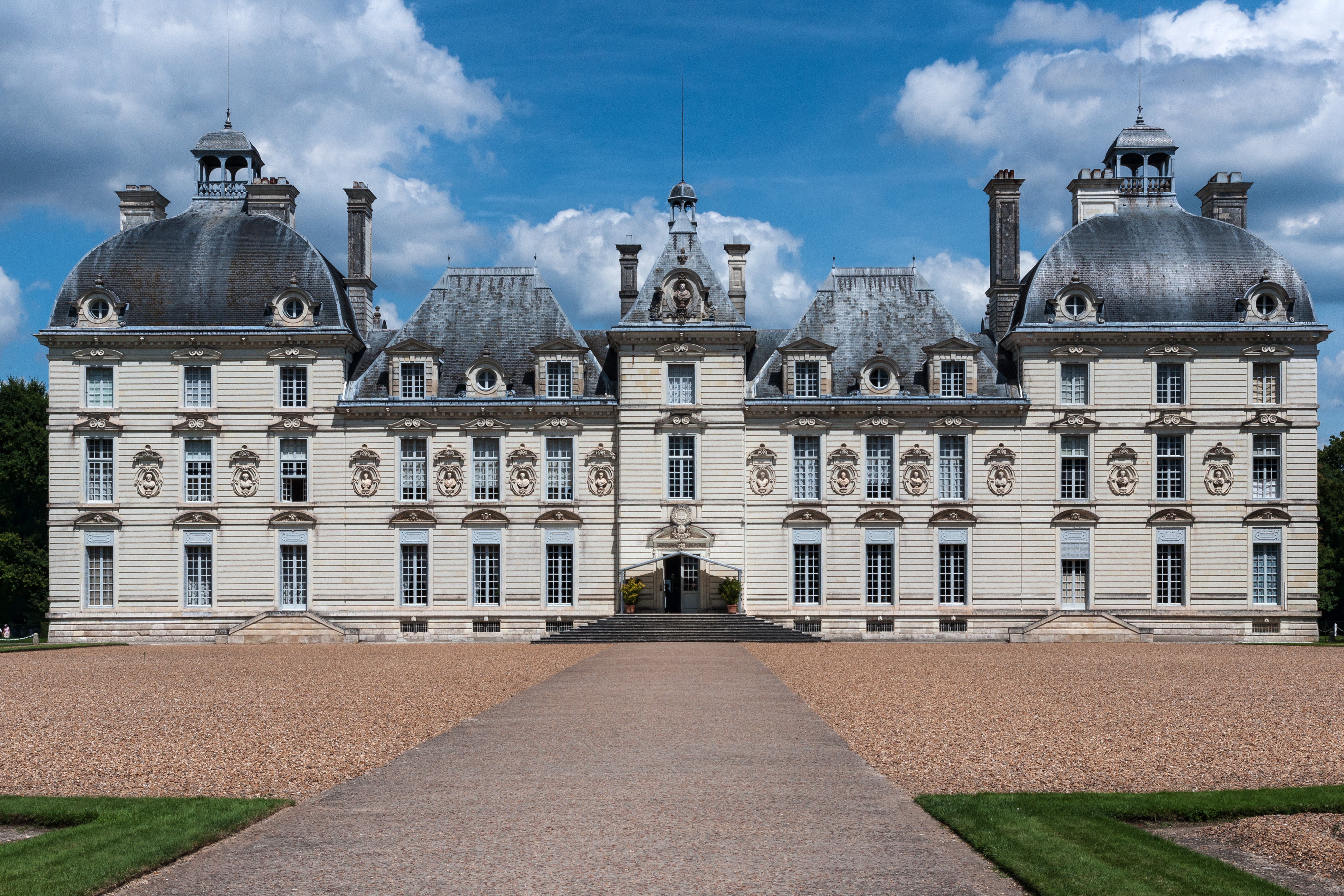 Château de Cheverny - Vue Frontale